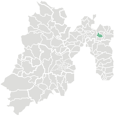 locatie van de gemeente Teotihuacán in Mexico (staat)